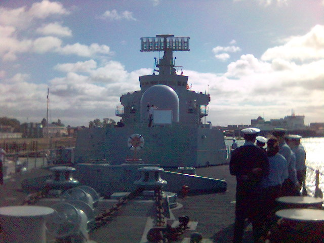 HMS Bristol